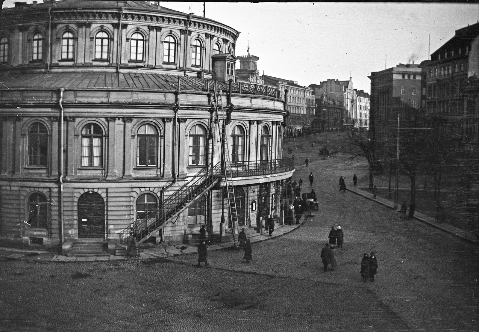 Ruotsalainen teatteri ja Erottaja kuvattuna "Wulffin kulmalta" n. vuonna 1920